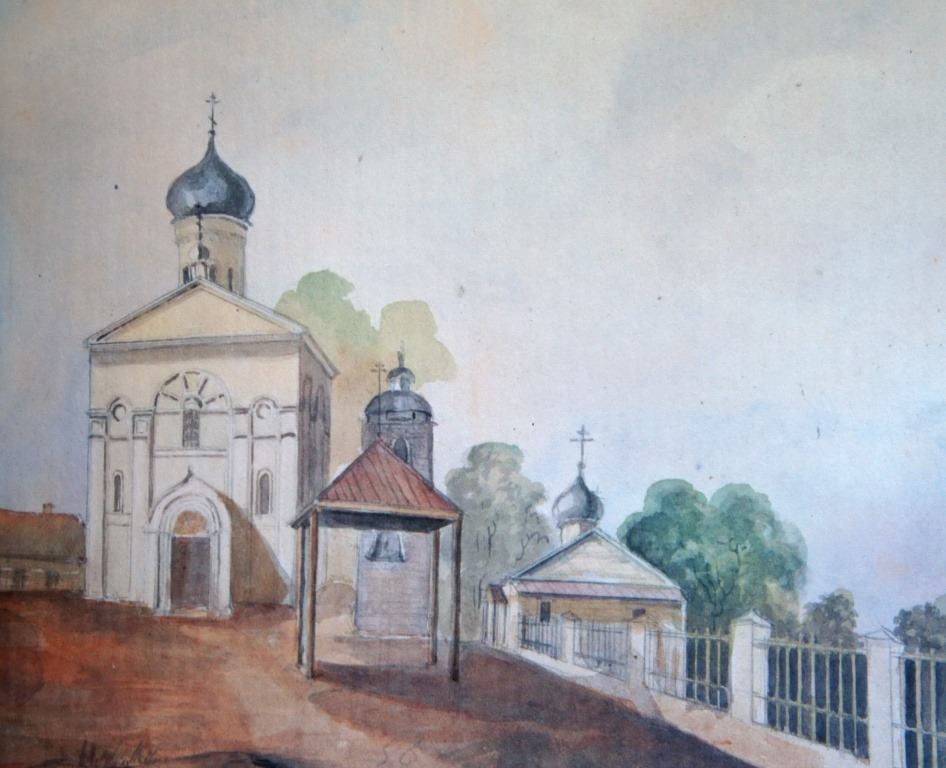 Беларуская (тарашкевіца): Полацак (Połacak), Спас (Spas). Манастыр